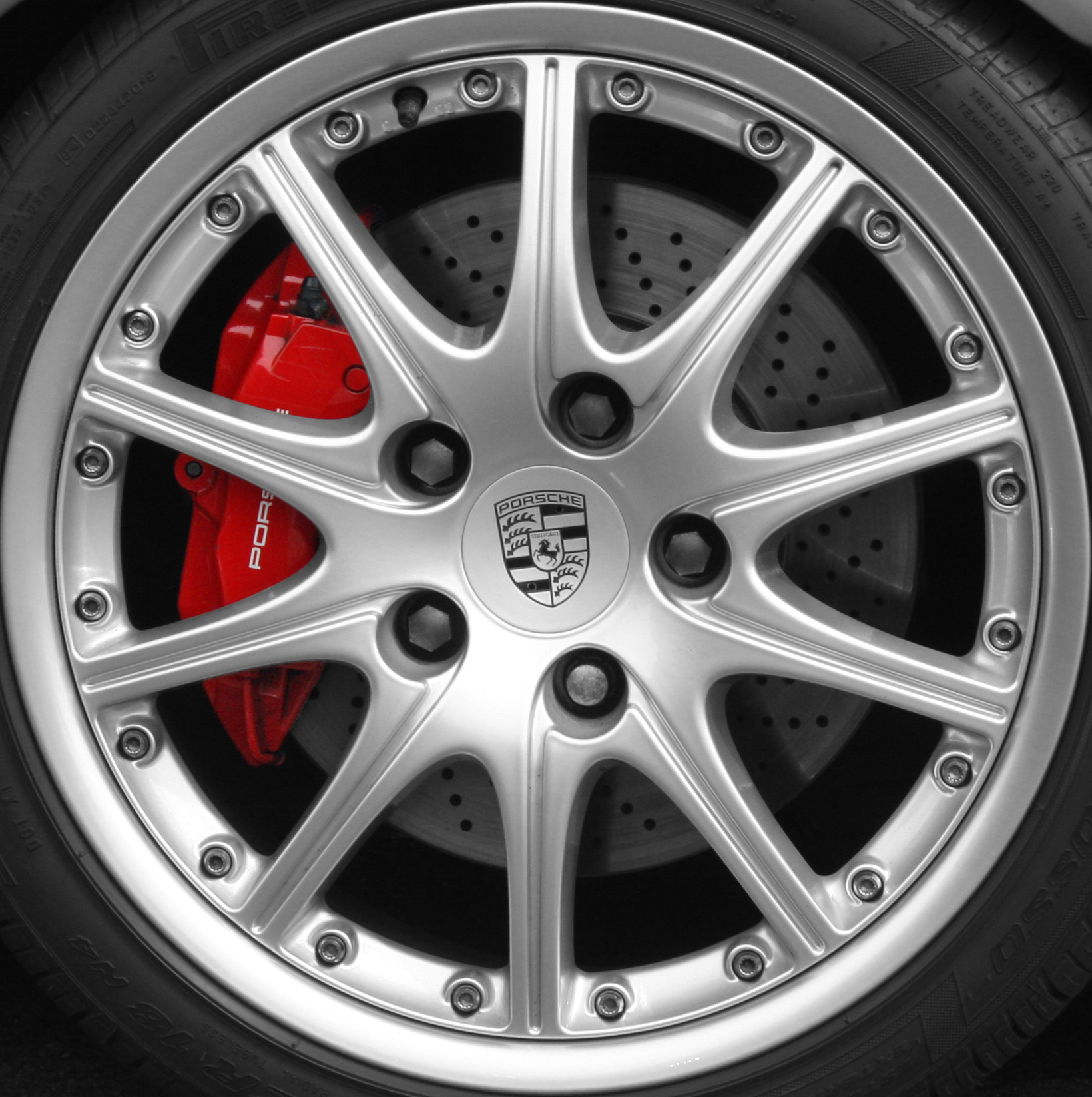 Porsche wheel